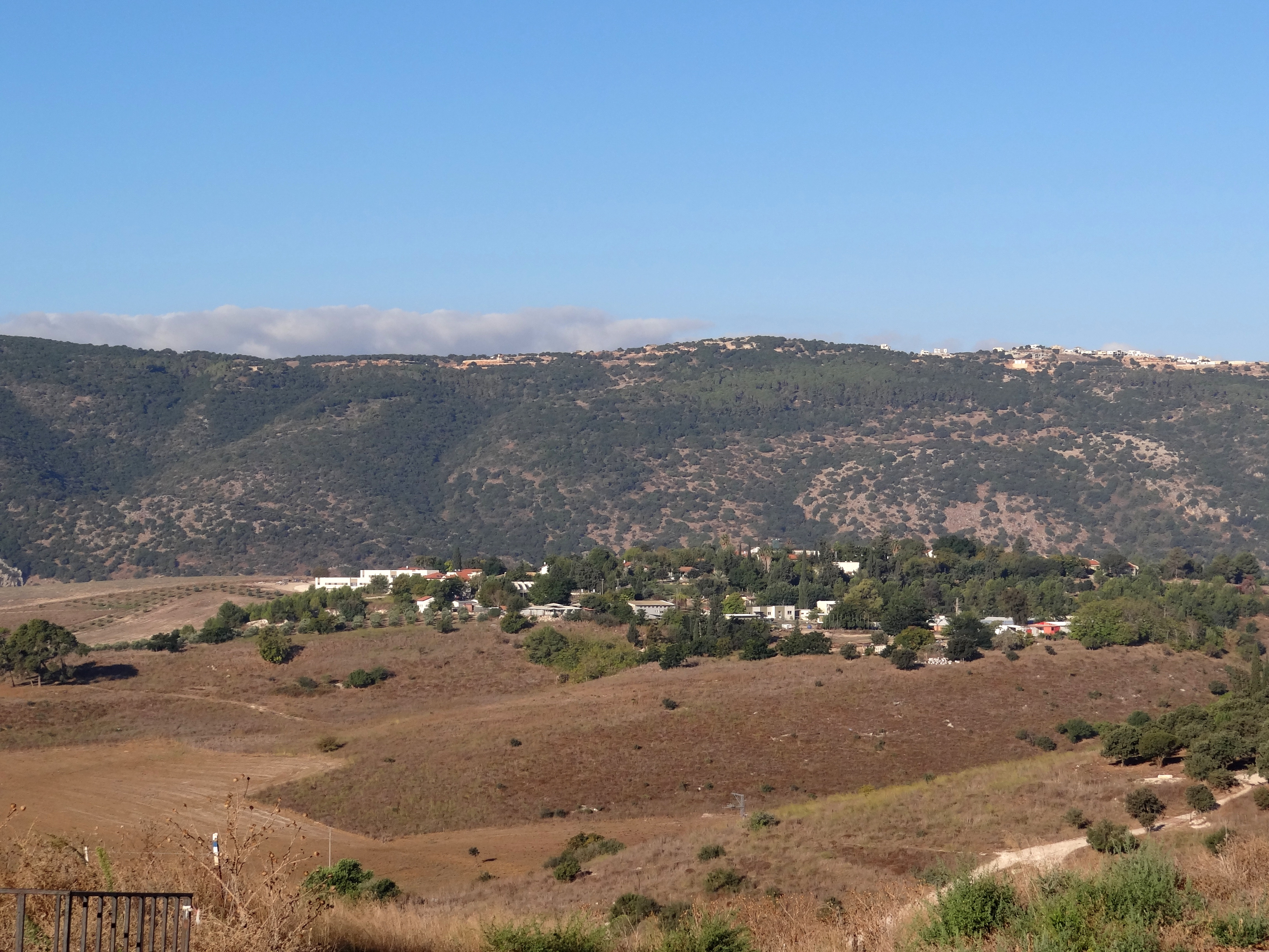 כפר תקוה הוא מרכז מגורים עבור בוגרים בעלי צרכים מיוחדים. הכפר נוסד על גבעות זייד בשטחה של קריית טבעון בשנות ה-60 של המאה העשרים לערך.